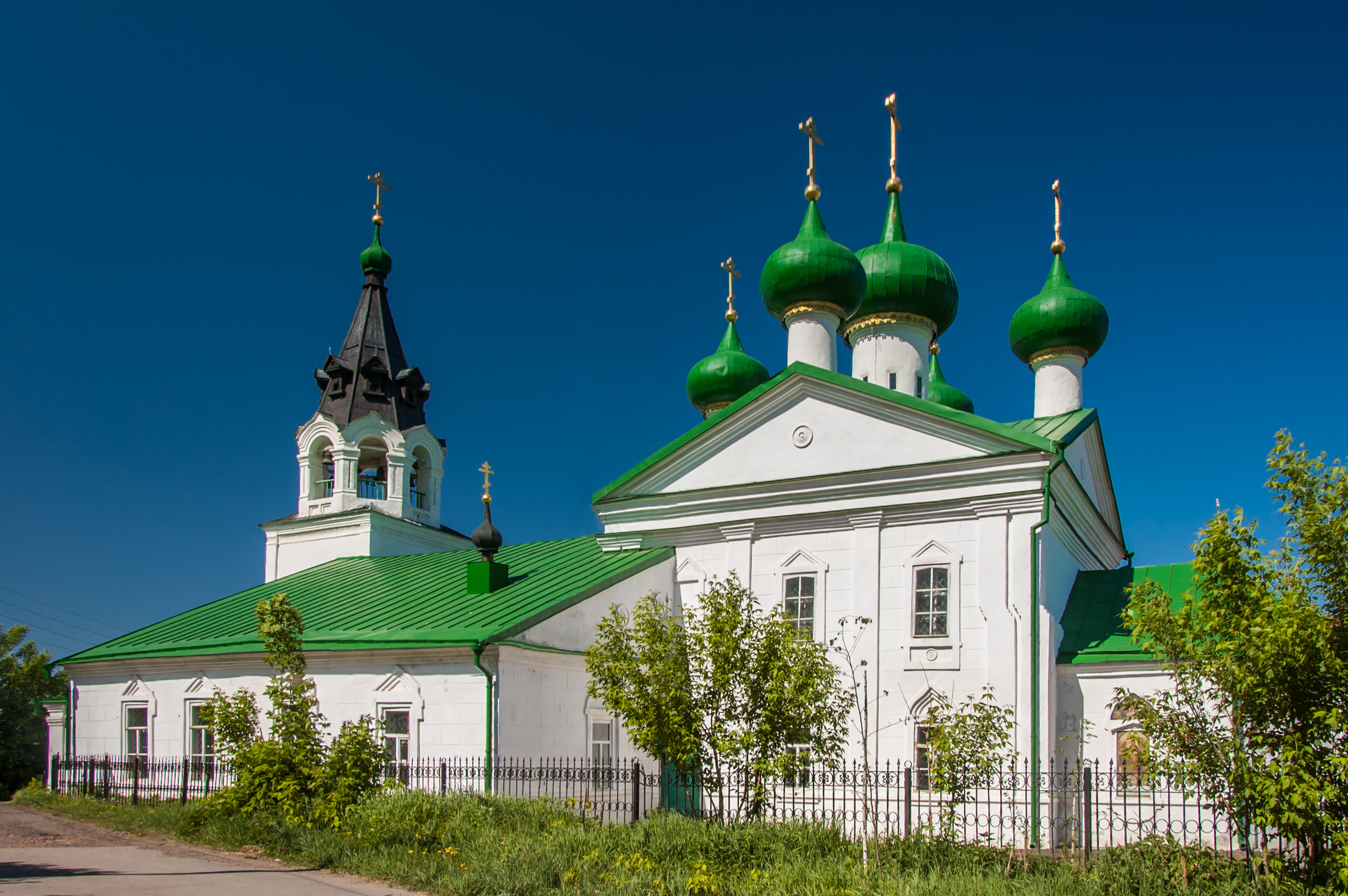 Церковь Спаса Преображения в Старых Печёрах: слобода Печёры, 124, Нижний Новгород, Нижегородская область